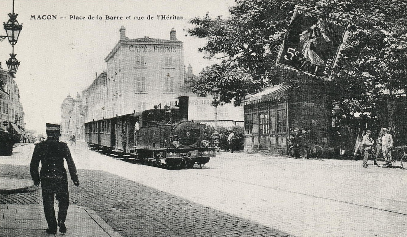 Le tacot de Fleurville sur la gare de la place de la Barre à Mâcon.